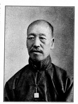 中文（台灣）: 王兆離議員